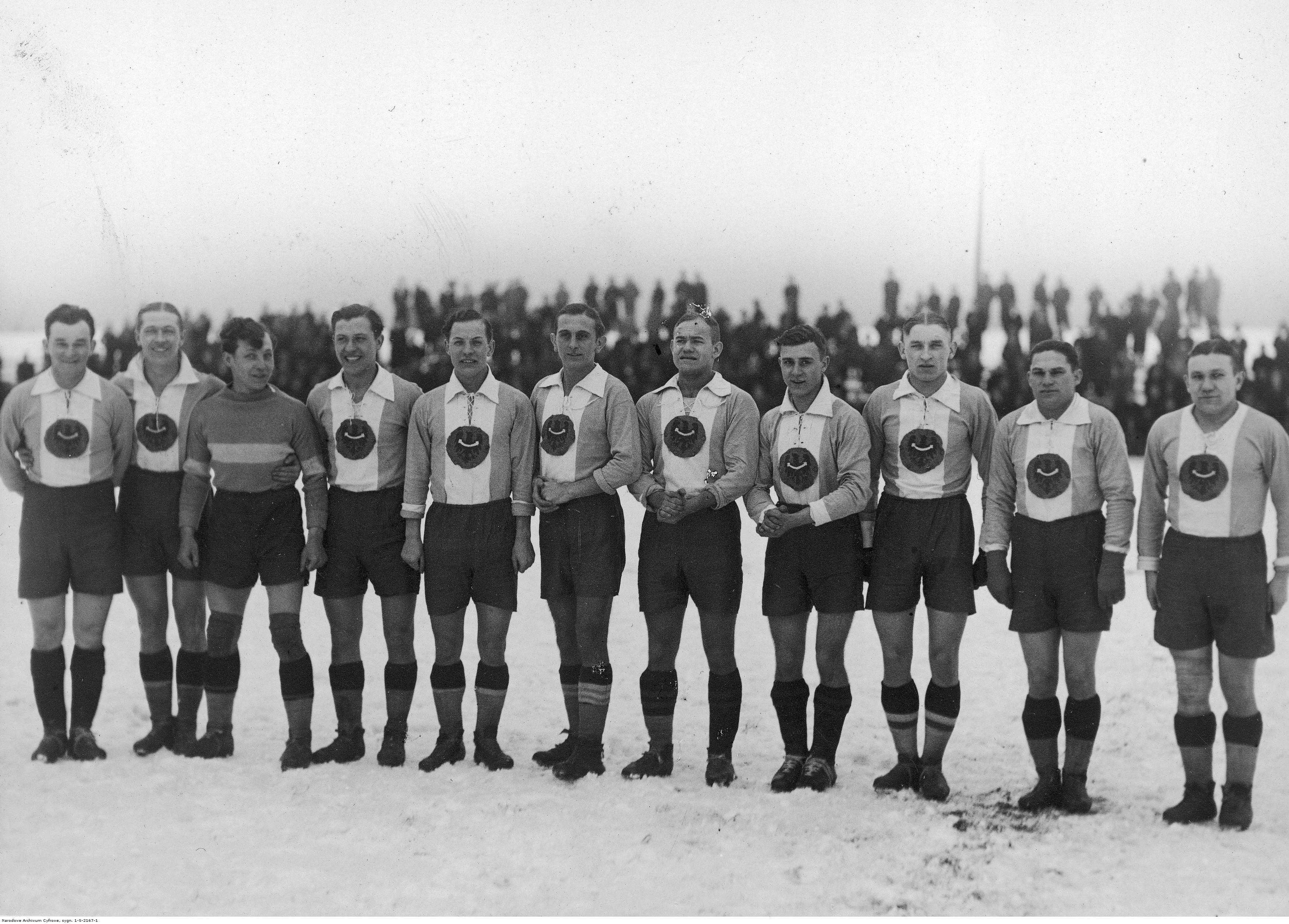 Mecz piłkarski Śląsk - Floridsdorfer AC w Katowicach.